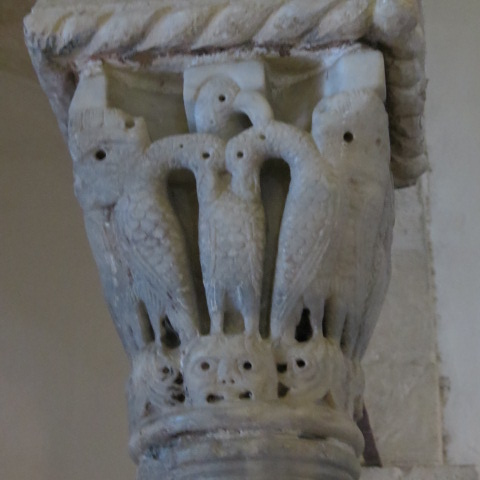 The Cenacle, also known as the "Upper Room", Last Supper Room - Mount Zion, Jerusalem, Israel Coenaculum, Cenaculum חדר הסעודה האחרונה